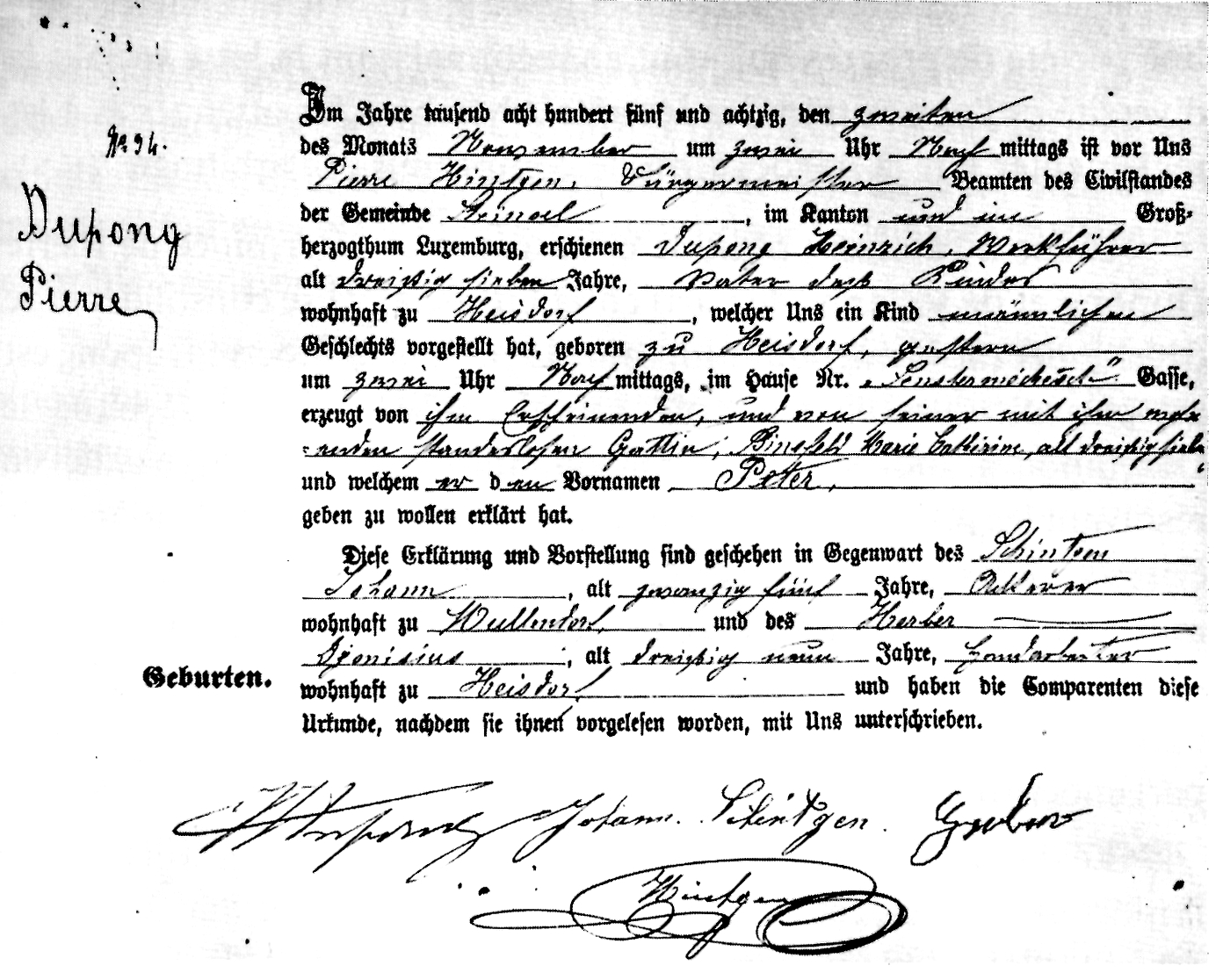 De Gebuertsschäi vum Pierre Dupong.